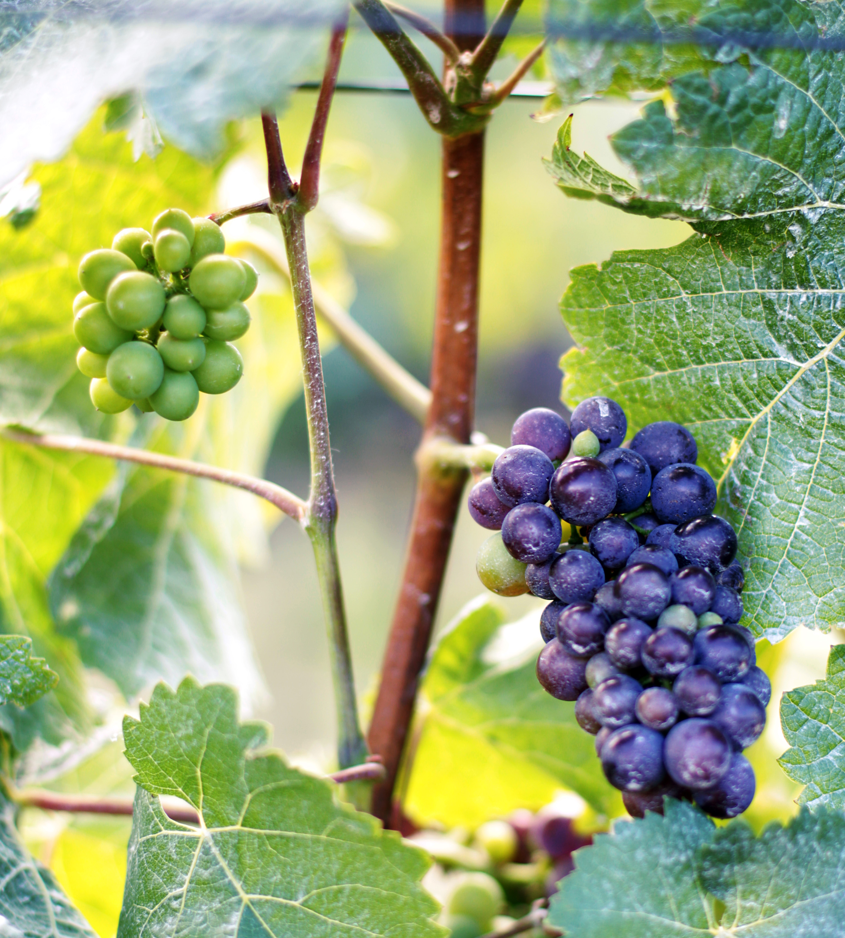 Grappe et verjus sur l'entrecoeur de Pinot Noir